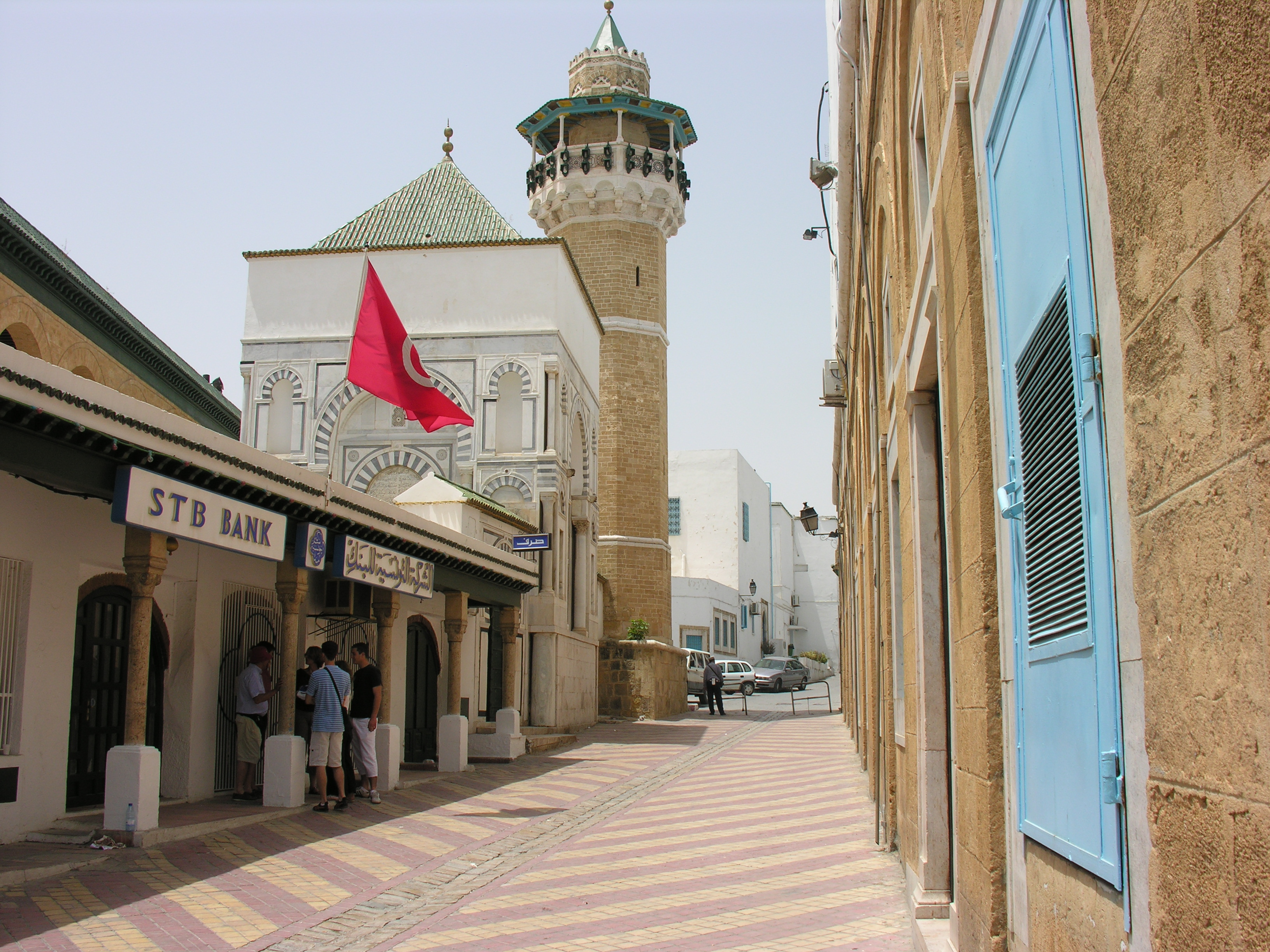 Minaret de la mosquée Sidi Yousef, derrière l'immeuble du premier ministère à Tunis